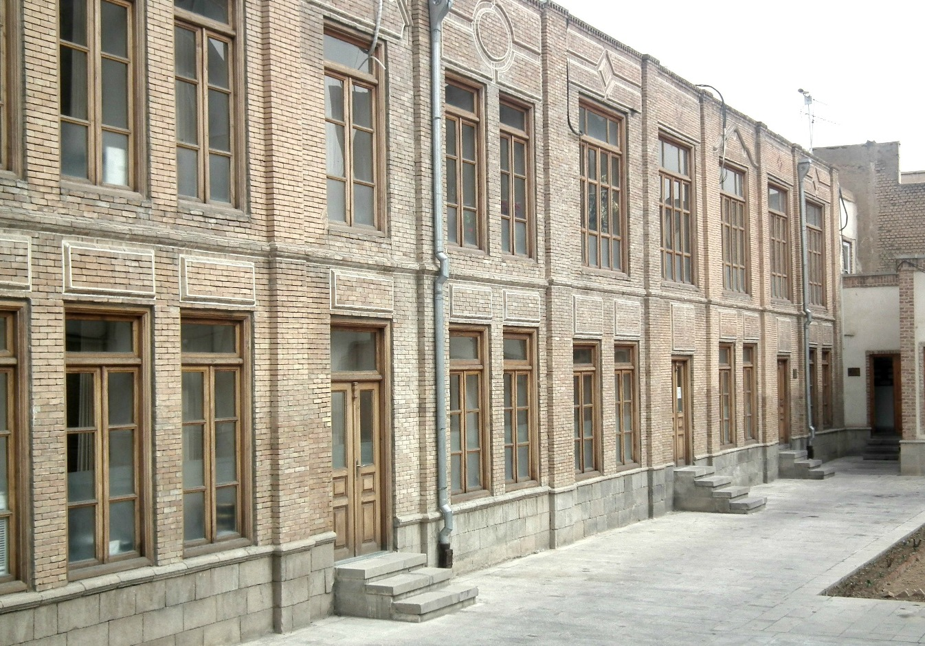 نمای ضلع شمالی مدرسع رشدیه خیابان ارتش تبریز